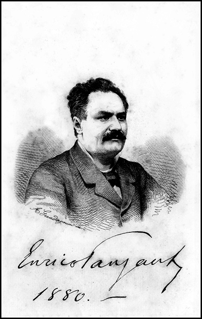 Illustrazione tratta da un libro pubblicato nel 1882: E. Panzacchi, Lyrica. Romanze e canzoni, Bologna, Zanichelli, 1882.